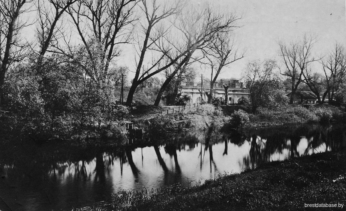 Базыльянская батарэя